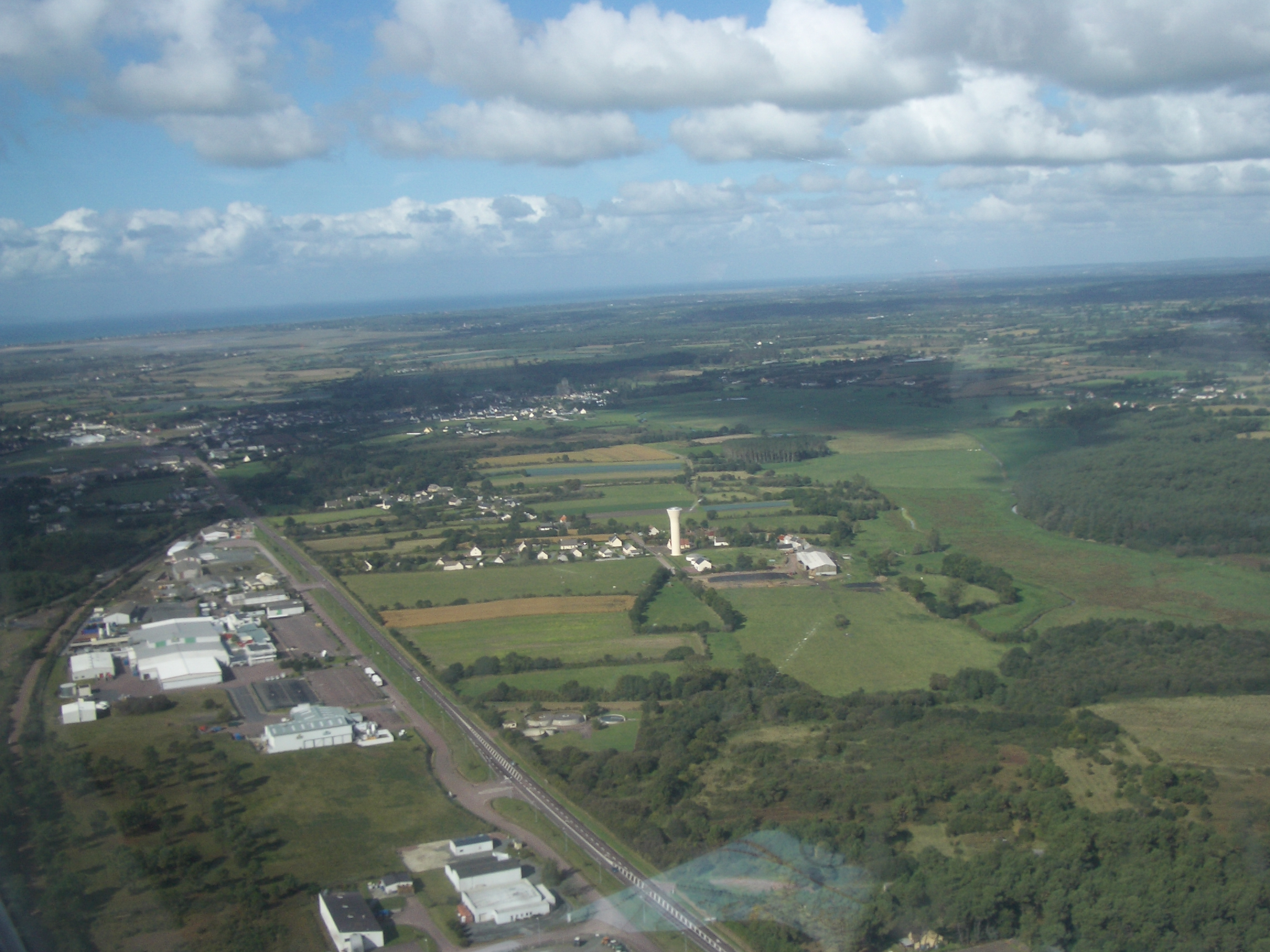 Vue d'avion de Lessay (département de la Manche, 50) : Chateau d'eau, zone industrielle, Abbatiale et, au loin, la mer.